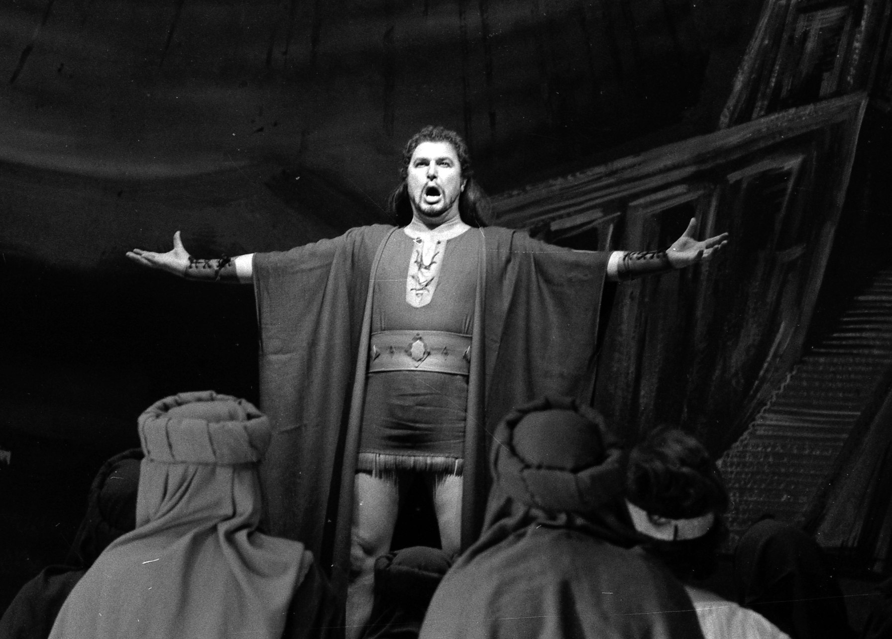 Théâtre du Capitole. Le 14 Octobre 1971. Vue de la représentation de Samson et Dalila au théâtre du Capitole.